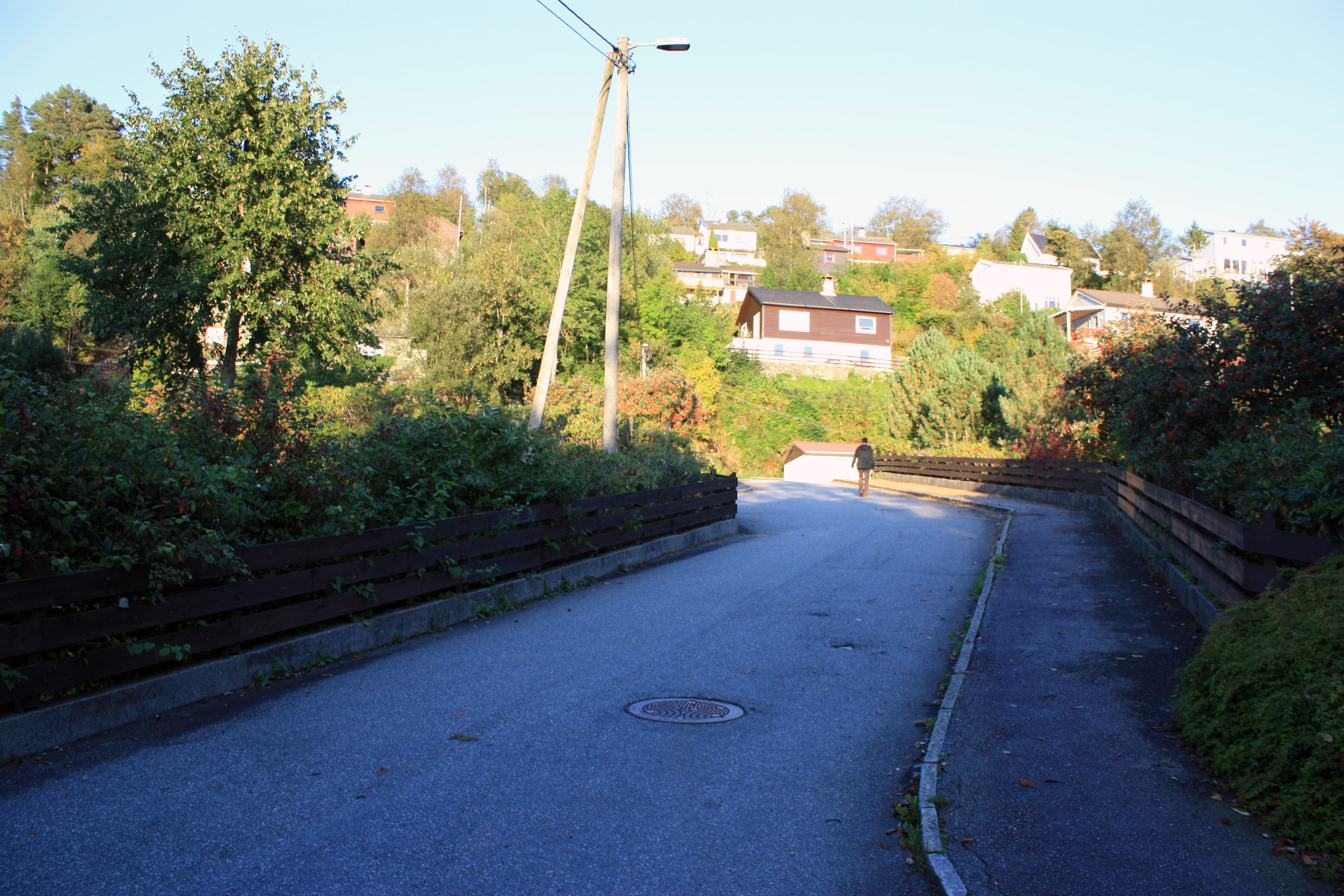 Dynevoll, Fana, Bergen.